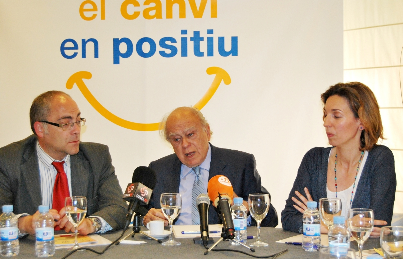 Municipals2011 Jordi Pujol a Igualada, entre Josep Miserachs i Angels Chacon.